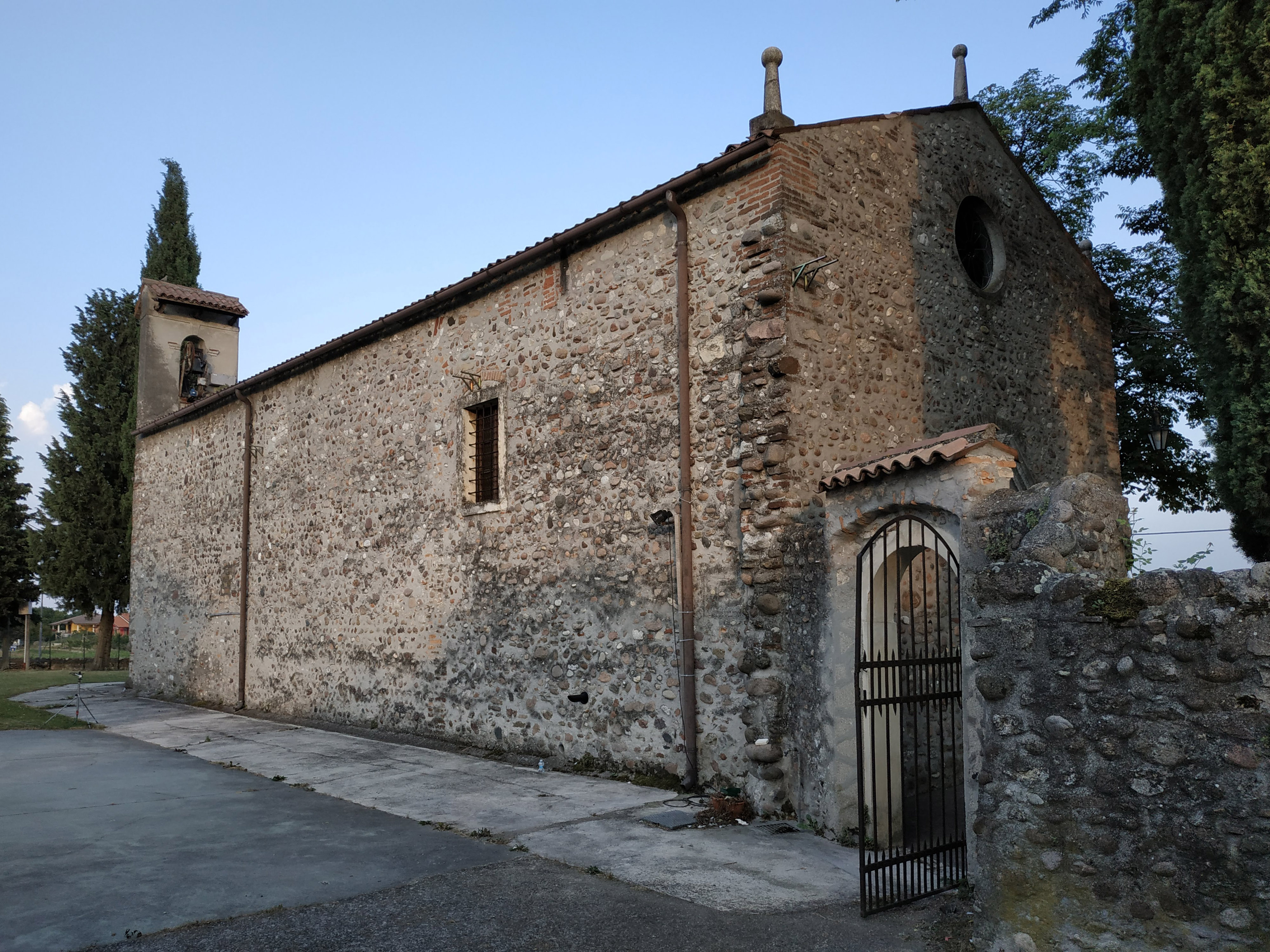 Vista della facciata e della parte laterale sinistra della chiesa di San Rocco in località Rosolotti, comune di Sona